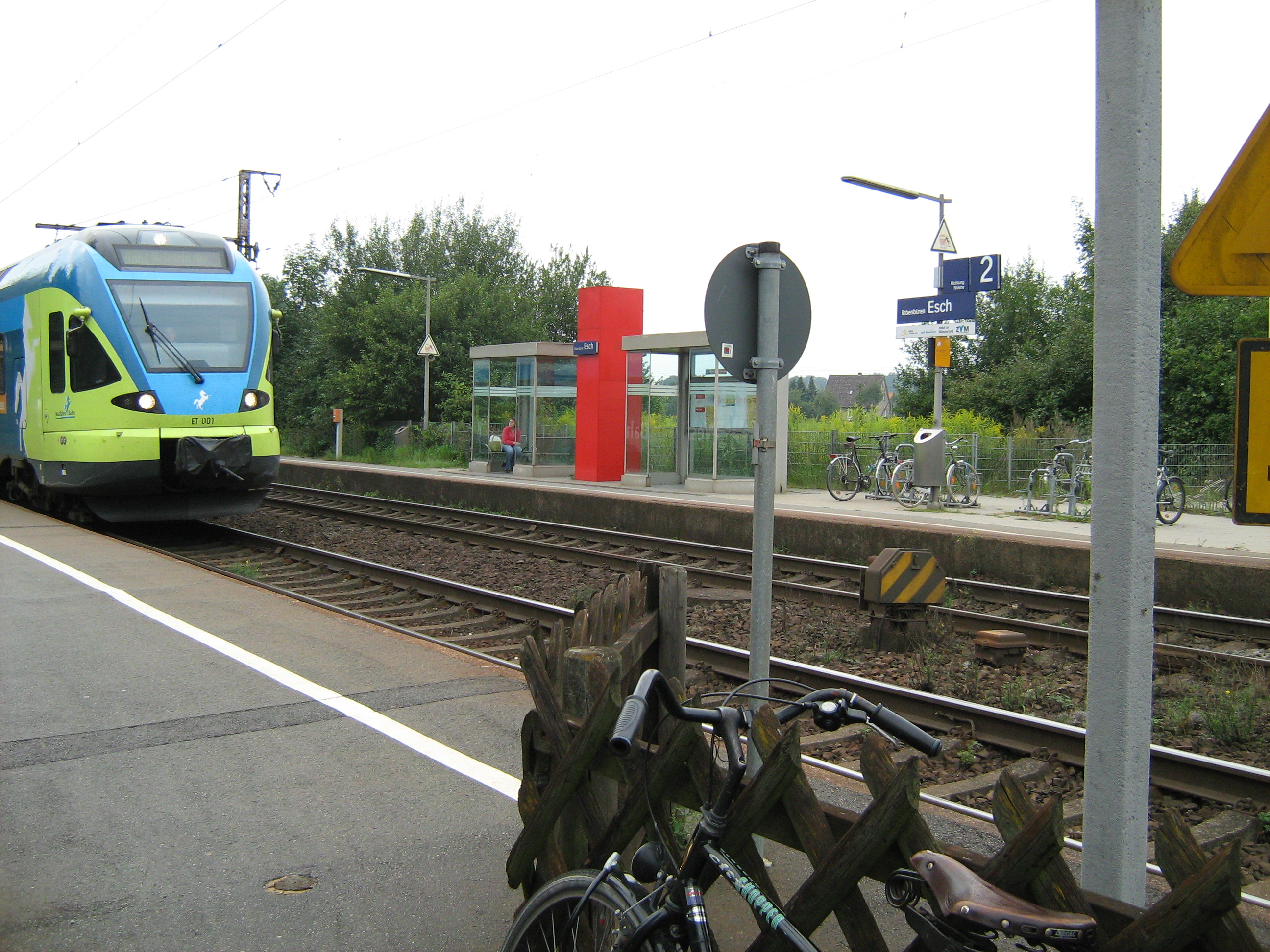 Haltestelle Ibbenbüren Esch